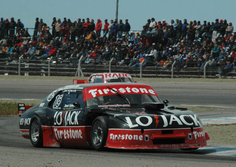 La siguiente es una fotografía del automóvil Chevrolet Chevy del piloto Marcos Di Palma. La misma fue tomada por Cholo Cano, fotógrafo de Argentina y publicada en su sitio web: La misma fue solicitada para su publicación en Wikipedia como lo exigen las leyes de Copyright.